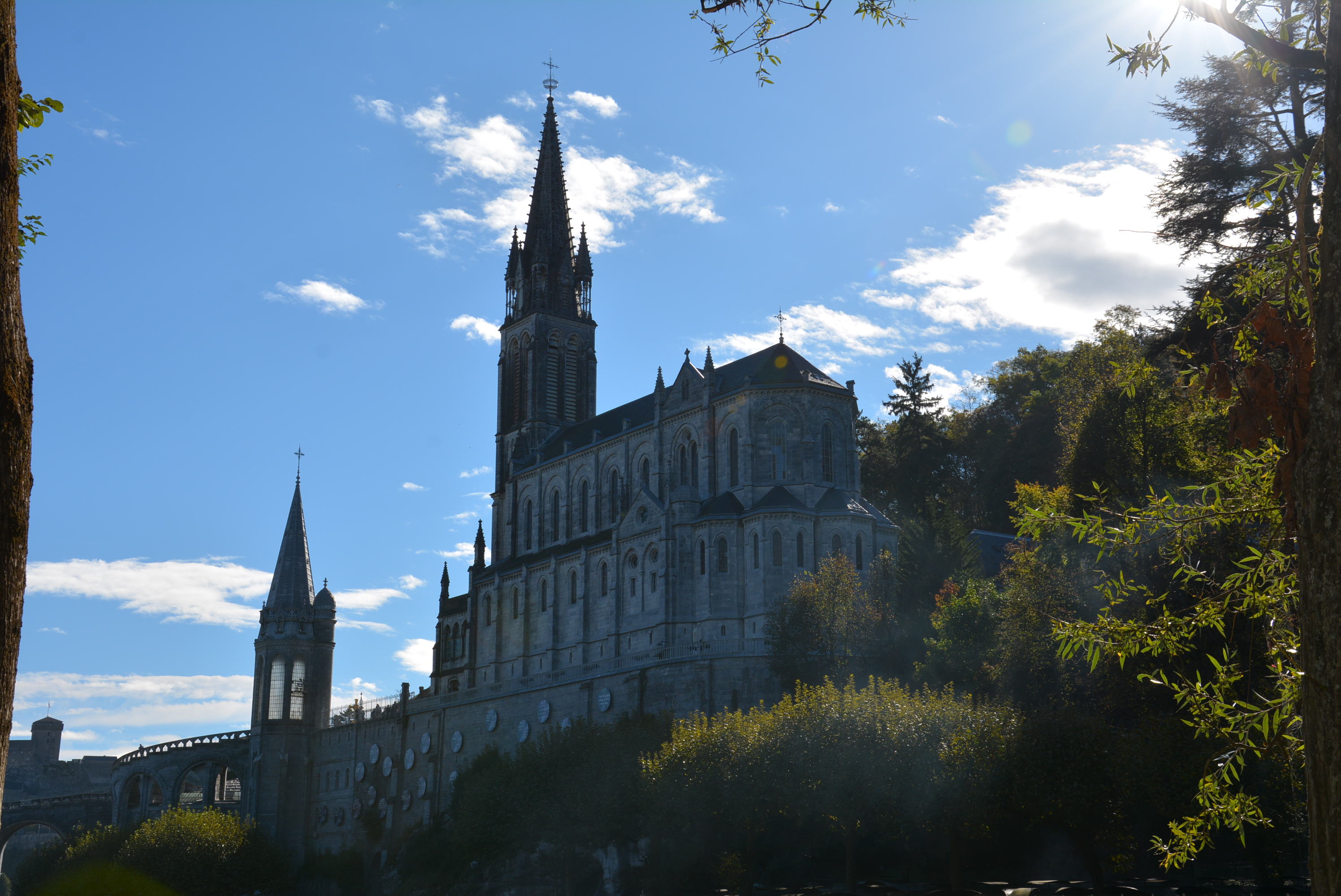 Basilica dell'Immacolata Concezione a Lourdes